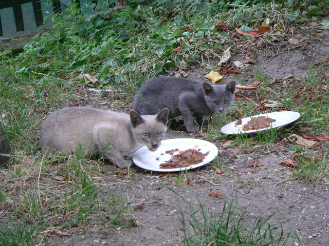 Photo de Max BOUCHE pour le Korat Club de France et Wikipedia : Korat type bluePoint (gènes récessifs) issus de parents Thaïlandais importés par le Club Français. Photo 640x480 prise le 6 juillet 2006 avec un boitier bridge DMC-FZ20 et une lentille Leica.